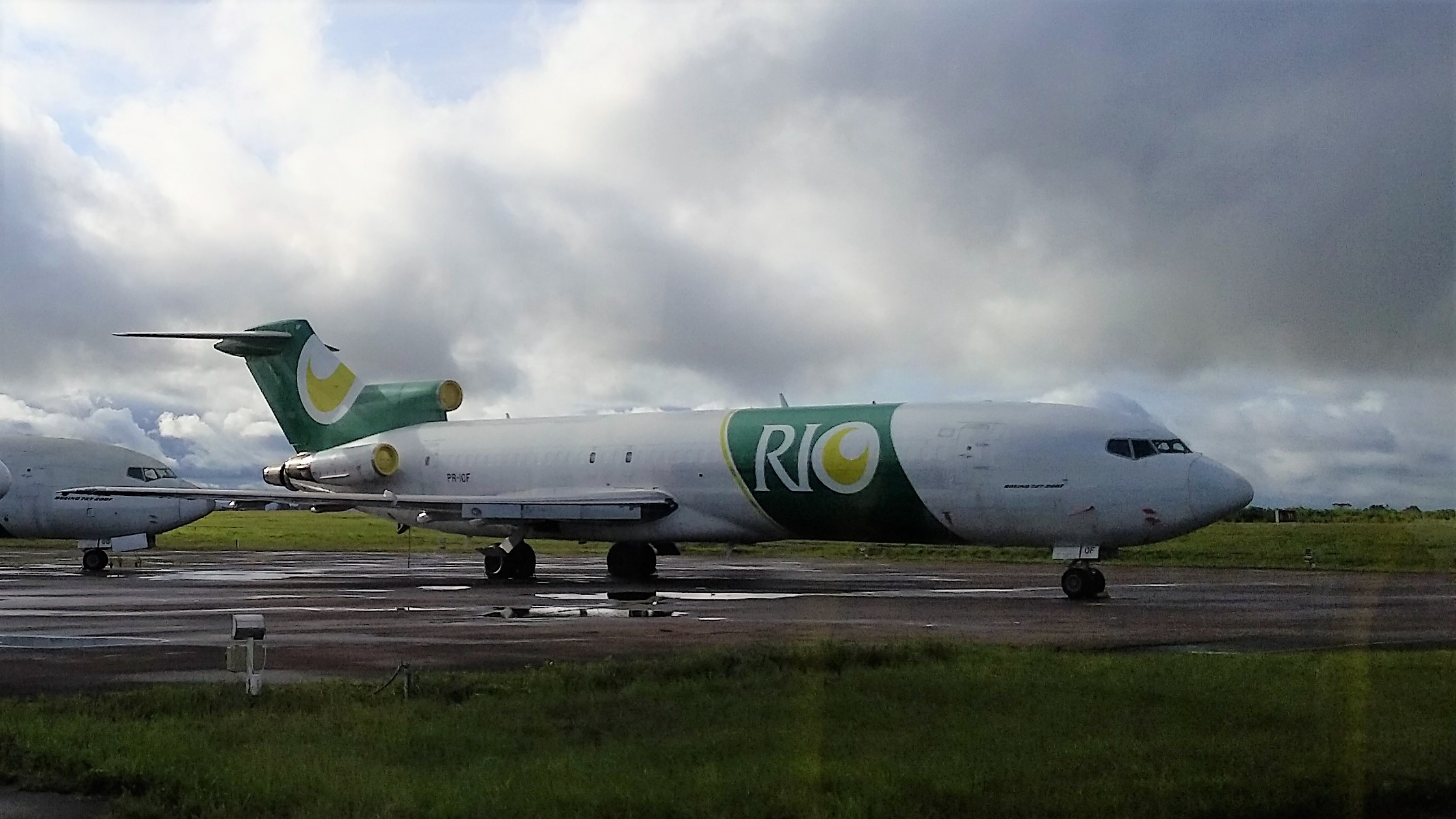 Avião Boing B727 da RIO PR-IOF SJP no Aeroporto Internacional de São José dos Pinhais-PR